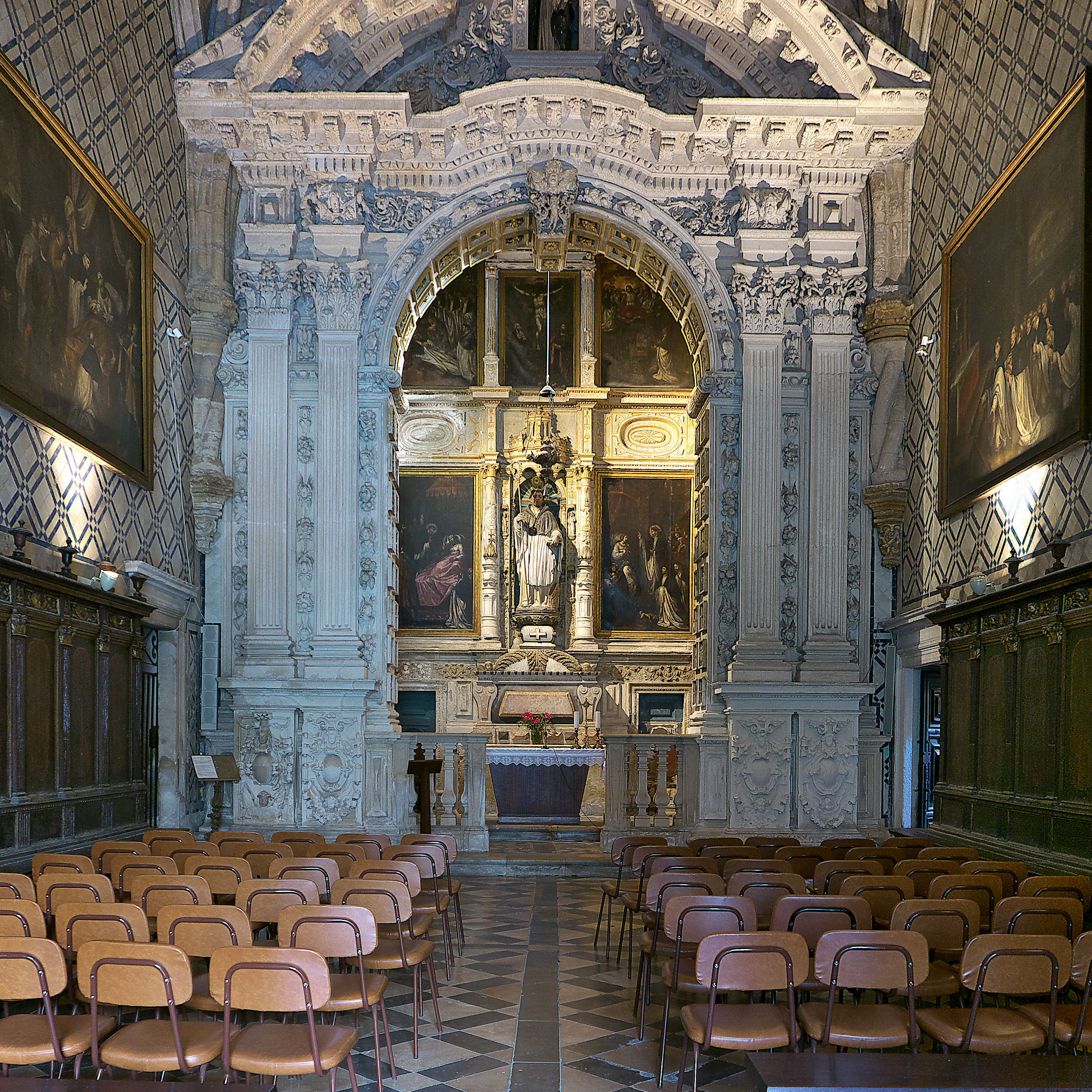 En ella se encuentra la Capilla de San Teotonio (†1162), primer prior del monasterio agustino. Tomé Velho (h. 1588)